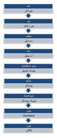 تۆرکجه: قافلان بانزرین بیر التی